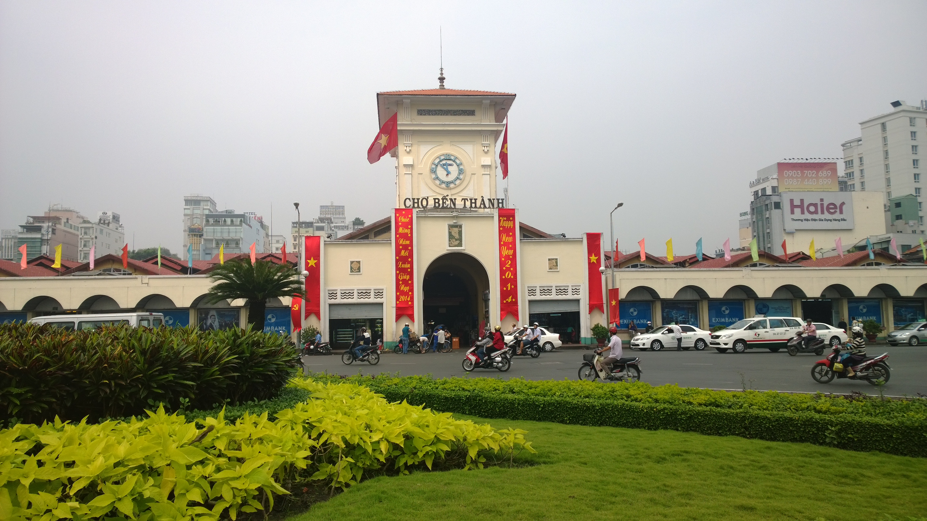 Chợ Bến Thành, Sài gòn Việt nam